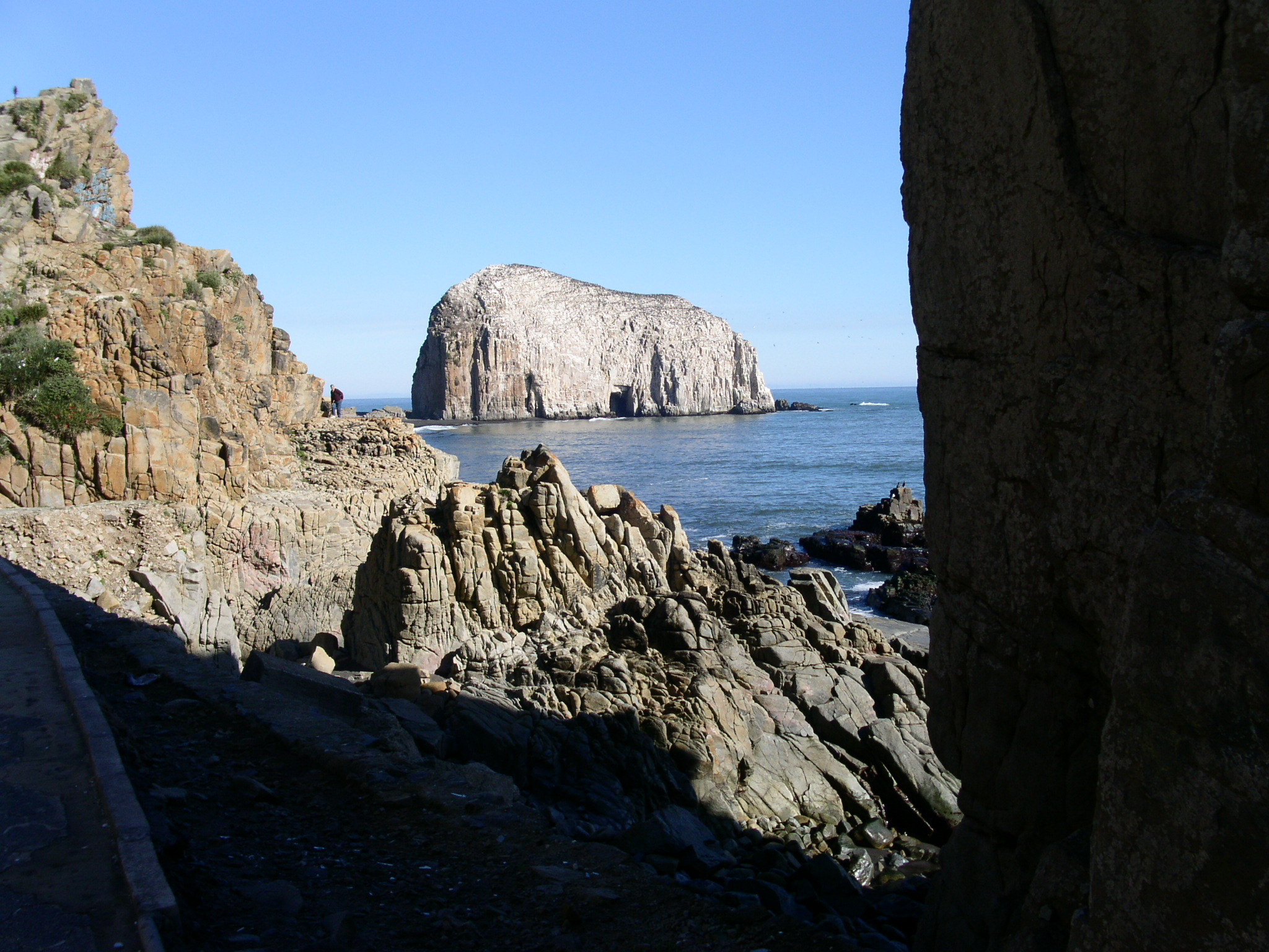 Naturwahrzeichen (Constitucion)